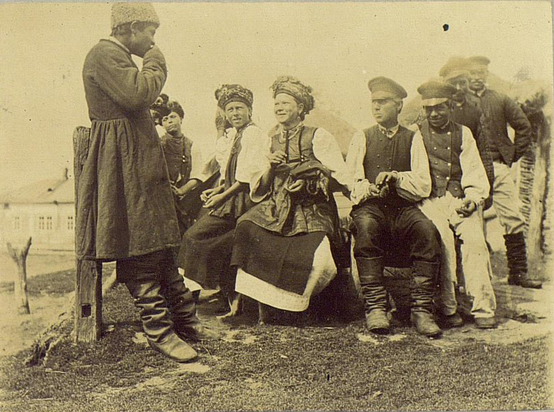 Традиційні вечорниці "Вулиця" на Полтавщині.